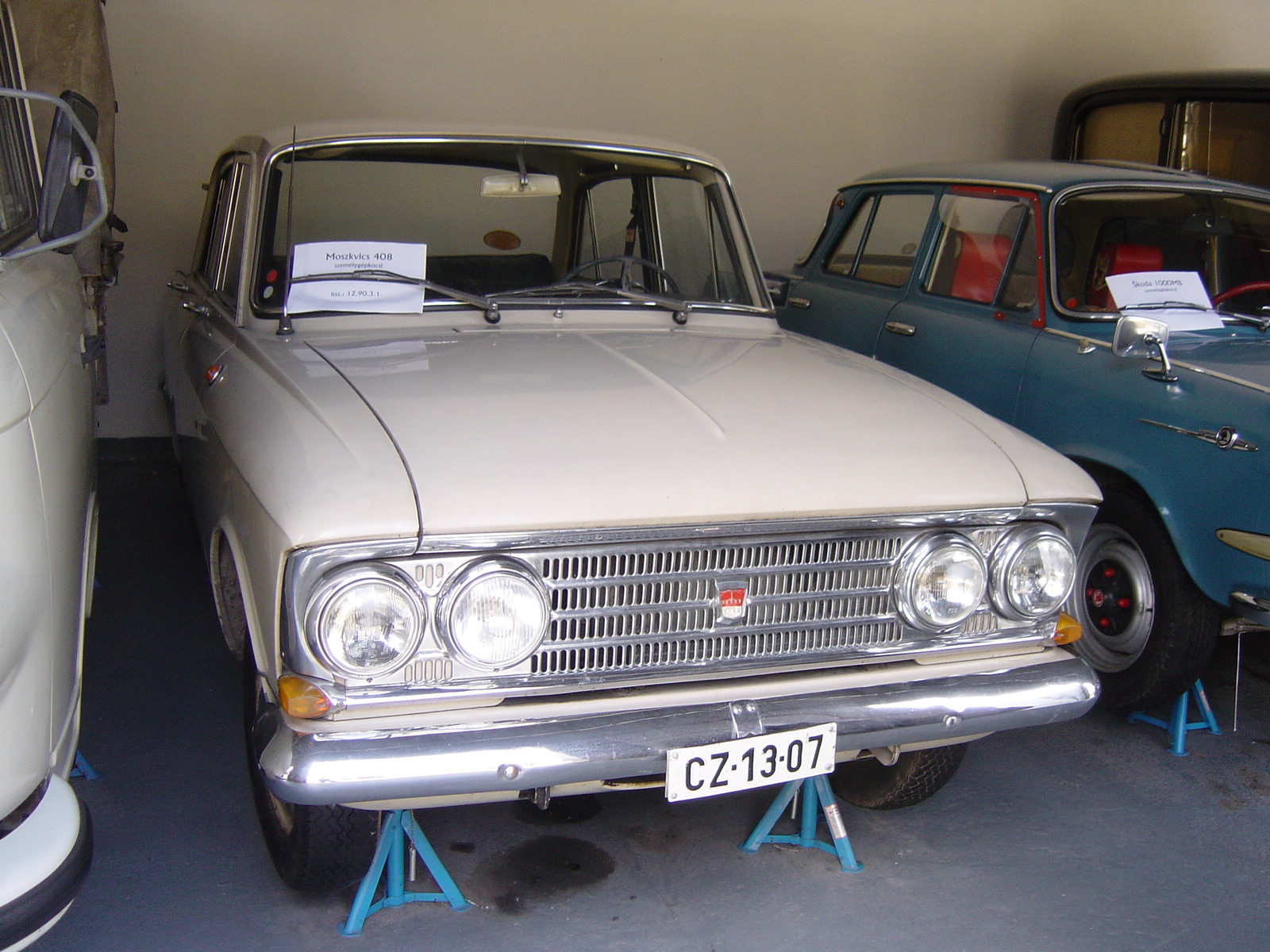 Moskvich 408 at the Közlekedési Múzeum in Hungary.